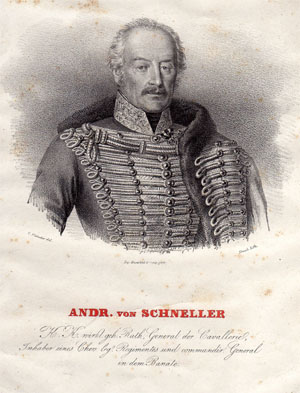 Andreas von Schneller, Bild im Besitze der Familie Schneller.